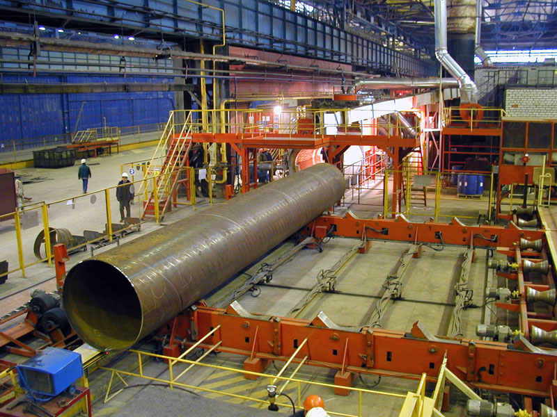 Волжский трубный завод. Цех, где изготавливаются трубы большого диаметра